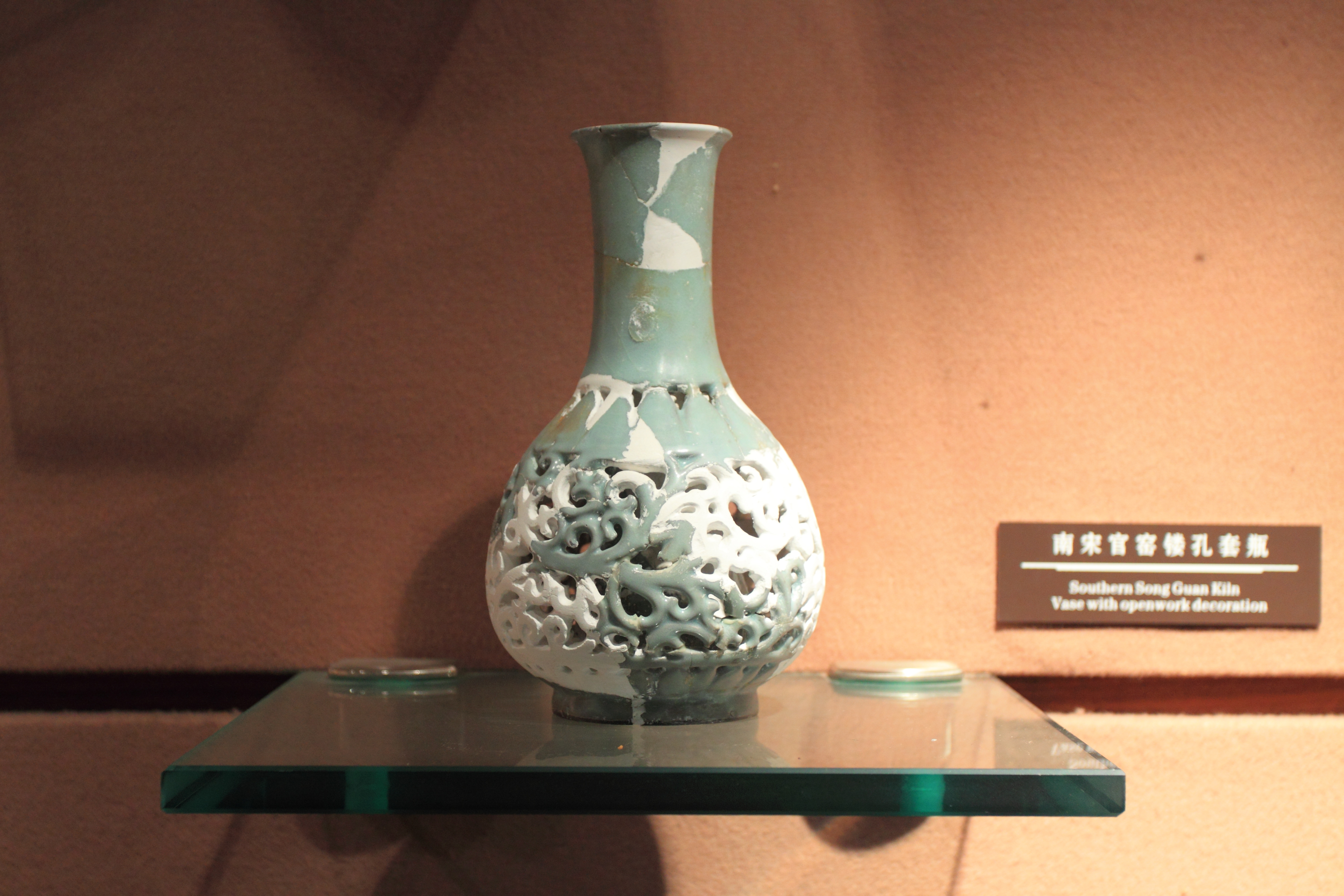 杭州南宋官窑博物馆藏品——南宋官窑镂孔套瓶。